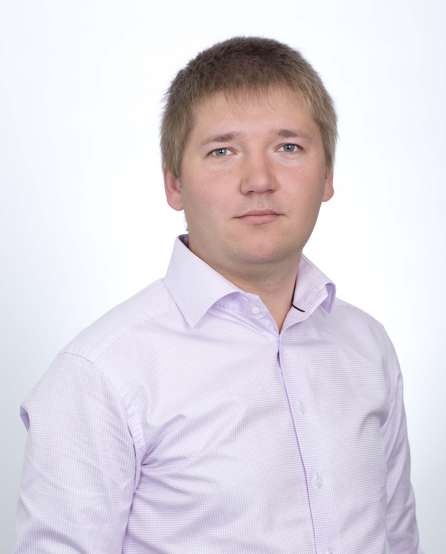 Haaslava vallavanem